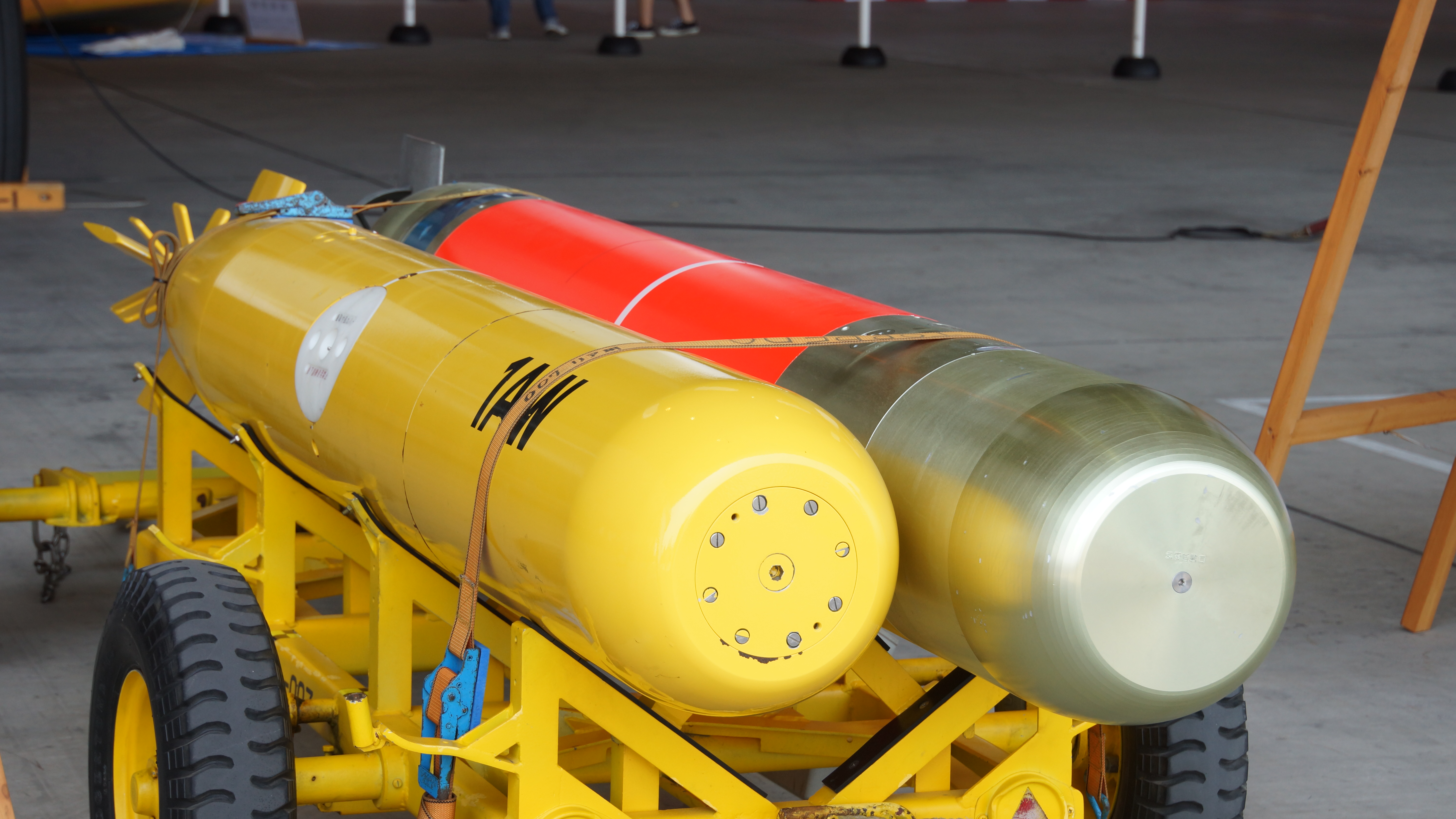 海上自衛隊 Mk.46及び97式ダミー魚雷 右前面。2017年4月30日 鹿屋航空基地にて。